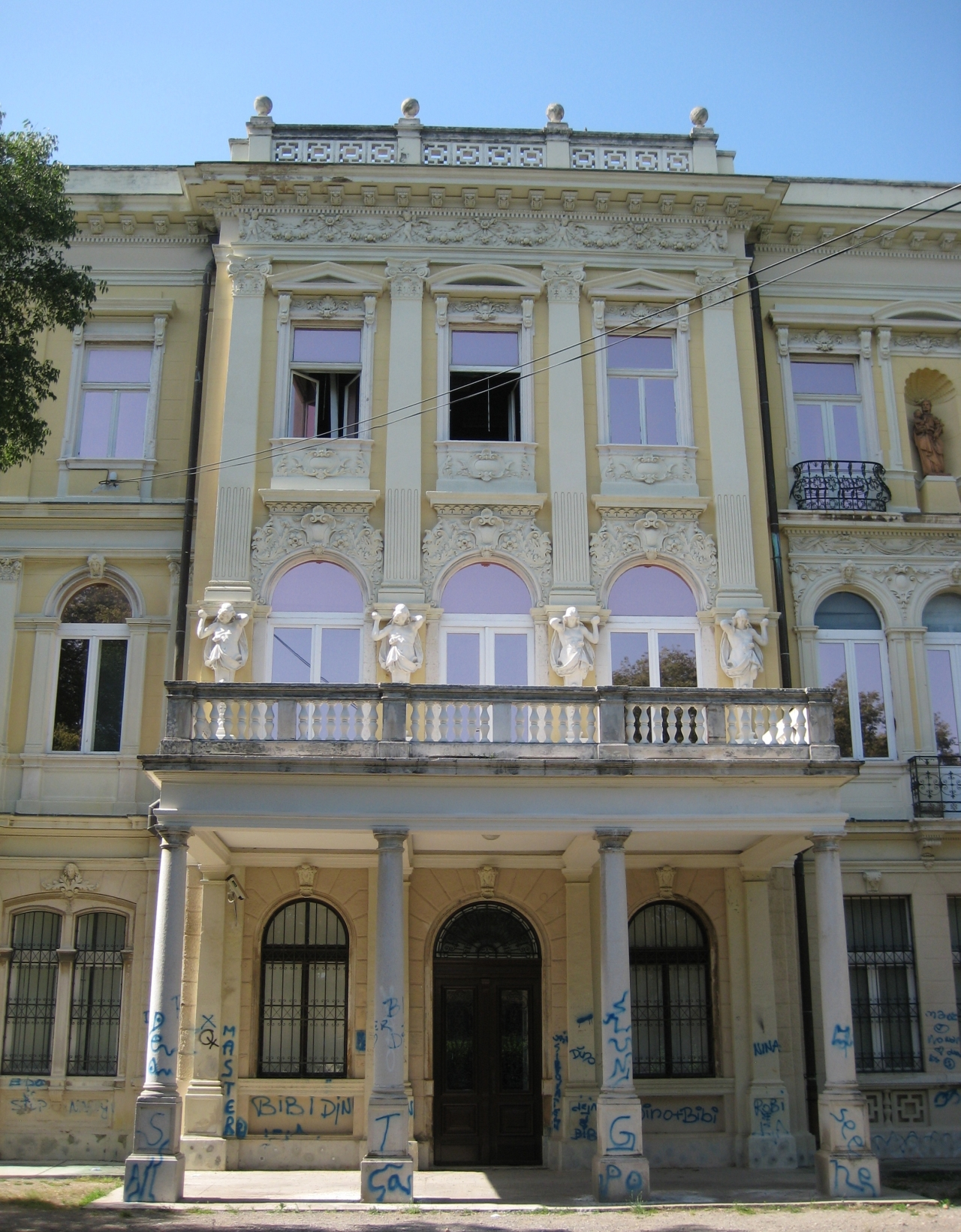 Državni arhiv u Rijeci